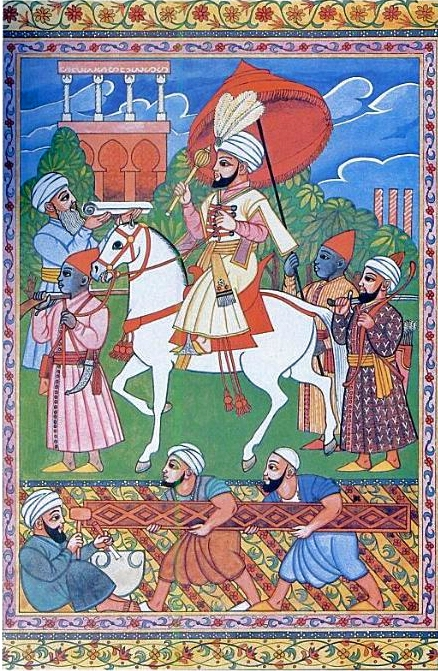 Le Sultan Saâdien Ahmedal-Mansour dans les jardins du palais El Badii à Marrackech . Miniature ottomane , 17 ème siècle.